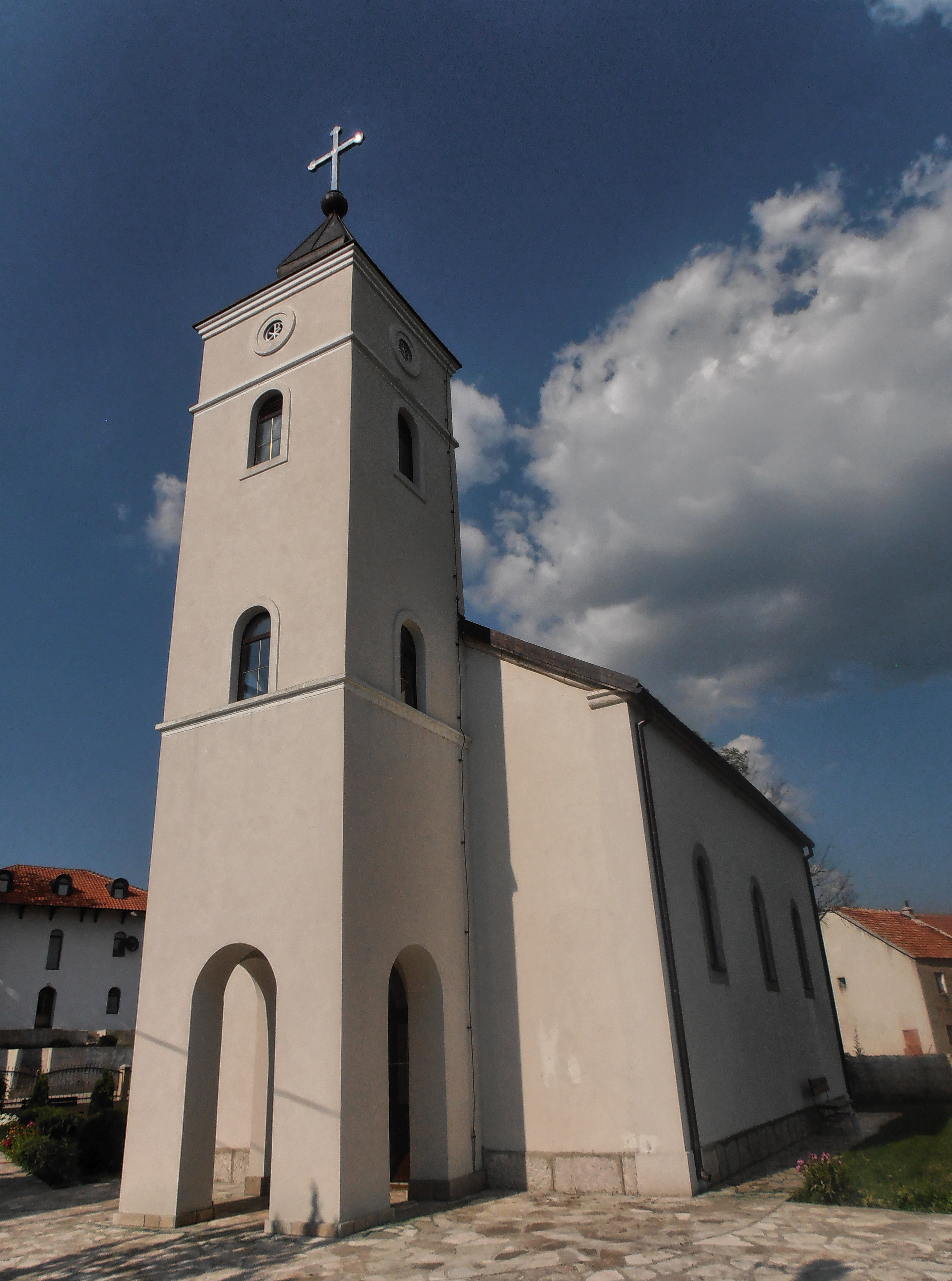 NKD299 Pravoslavna crkva sv. Vasilija Ostroškog u Avtovcu